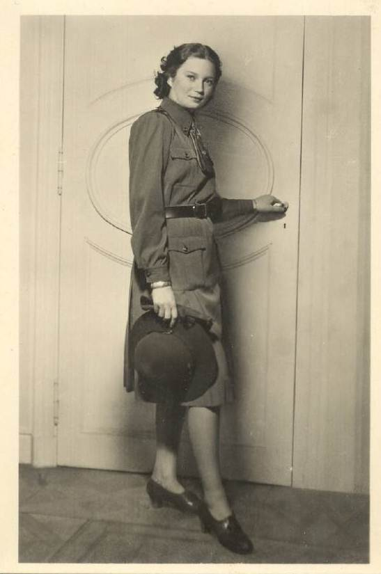 La Princesse Joséphine Charlotte - Junior d'Honneur de la Croix-Rouge de Belgique en uniforme.